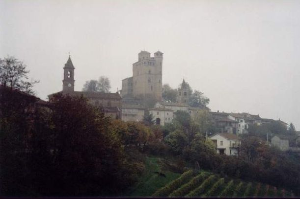 Serralunga d'Alba - vista d'insieme - foto realizzata da utente Microsoikos